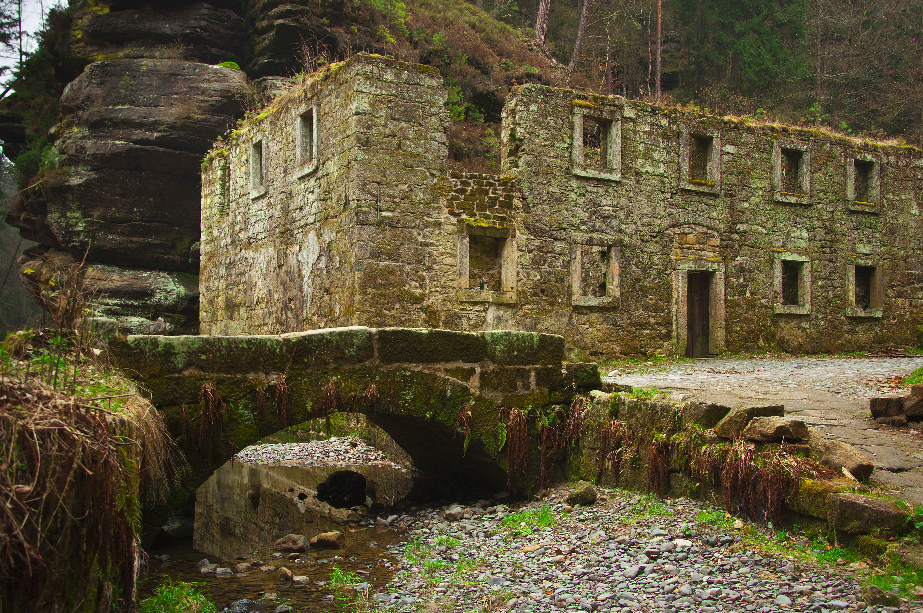 Vodní mlýn tzv. Dolský (Kamenická Stráň), Kamenická Stráň